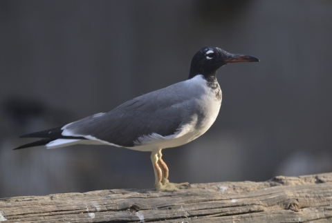 שחף לבן עין